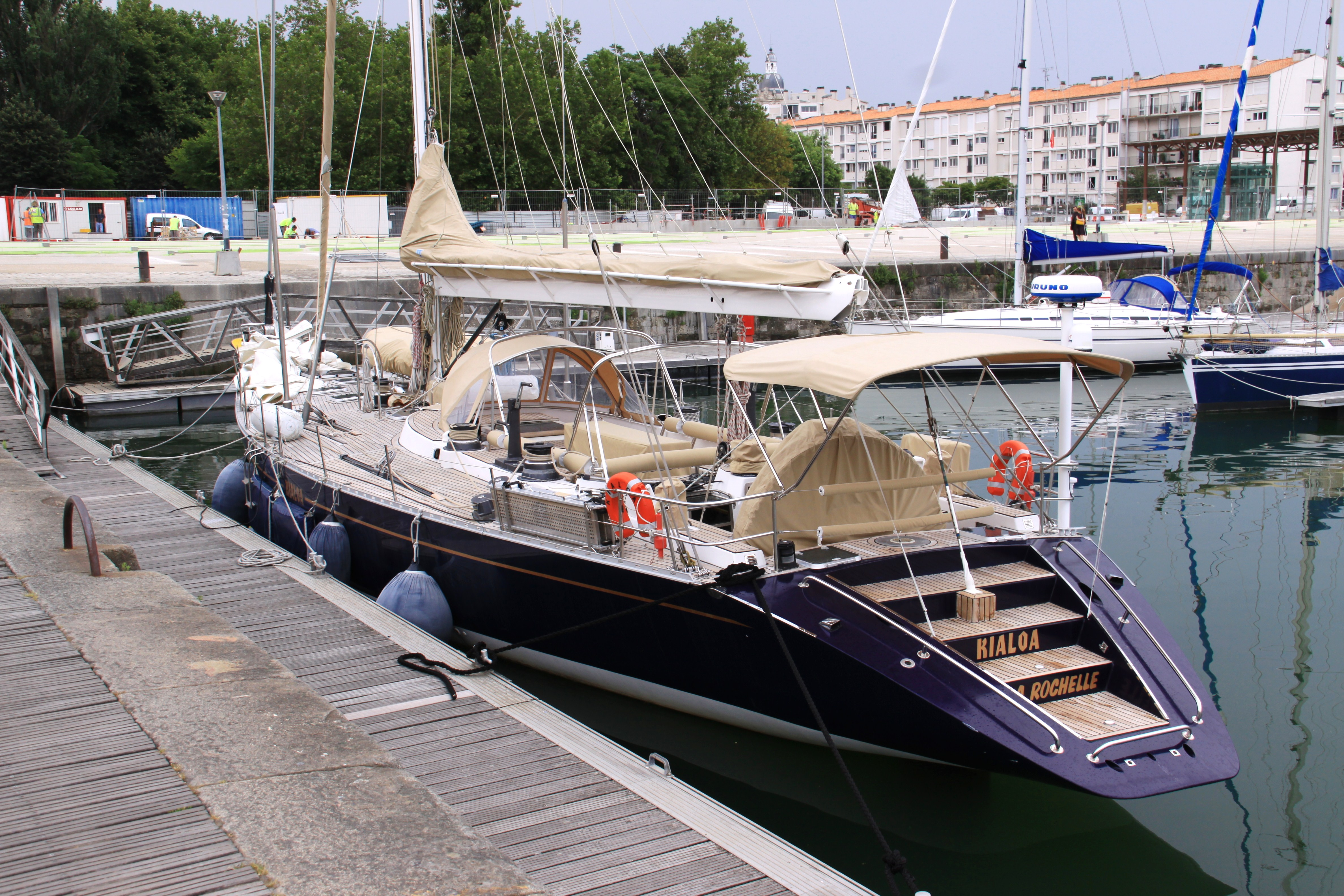 Ce voilier de course appelé « Kialoa » et immatriculé à La Rochelle est le « Kialoa IV » appartenant à la série des « Kialoa » (« Kialoa » II à V). Cette famille de voiliers de course a été construite durant les années 1960 à 1980 à la demande de Jim Kilroy, un américain passionné de régates et ayant fait fortune dans le secteur immobilier en fondant la Kilroy Realty Corporation. Le voilier de course « Kialoa IV » est un maxi yacht de 80 pieds (24 mètres) construit en 1979 par Kiwi Yachts en Nouvelle Zélande. Il a été utilisé, entre autres, dans la tragique Fastnet Race de 1979 (décès de 15 participants lors d’ une tempête) et dans plusieurs Maxi Yacht Rolex Cup. En 1986, Jim Kilroy a remplacé le « Kialoa IV » par le « Kialoa V » dernier de la série. Par rapport à son aspect original le « Kialoa IV a été repeint d’ une couleur différente (en violé sur la photographie) et le tableau arrière à été modifié par la construction d’ un escalier d’ accès à la mer. La Rochelle, Charente Maritime, France.